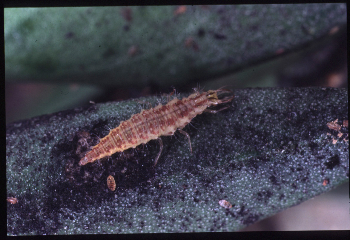 Larve de Chrysoperla carnea en train de manger des cochenilles saissetia oleae de stade 1 sur une feuille d'olivier couverte de fumagine